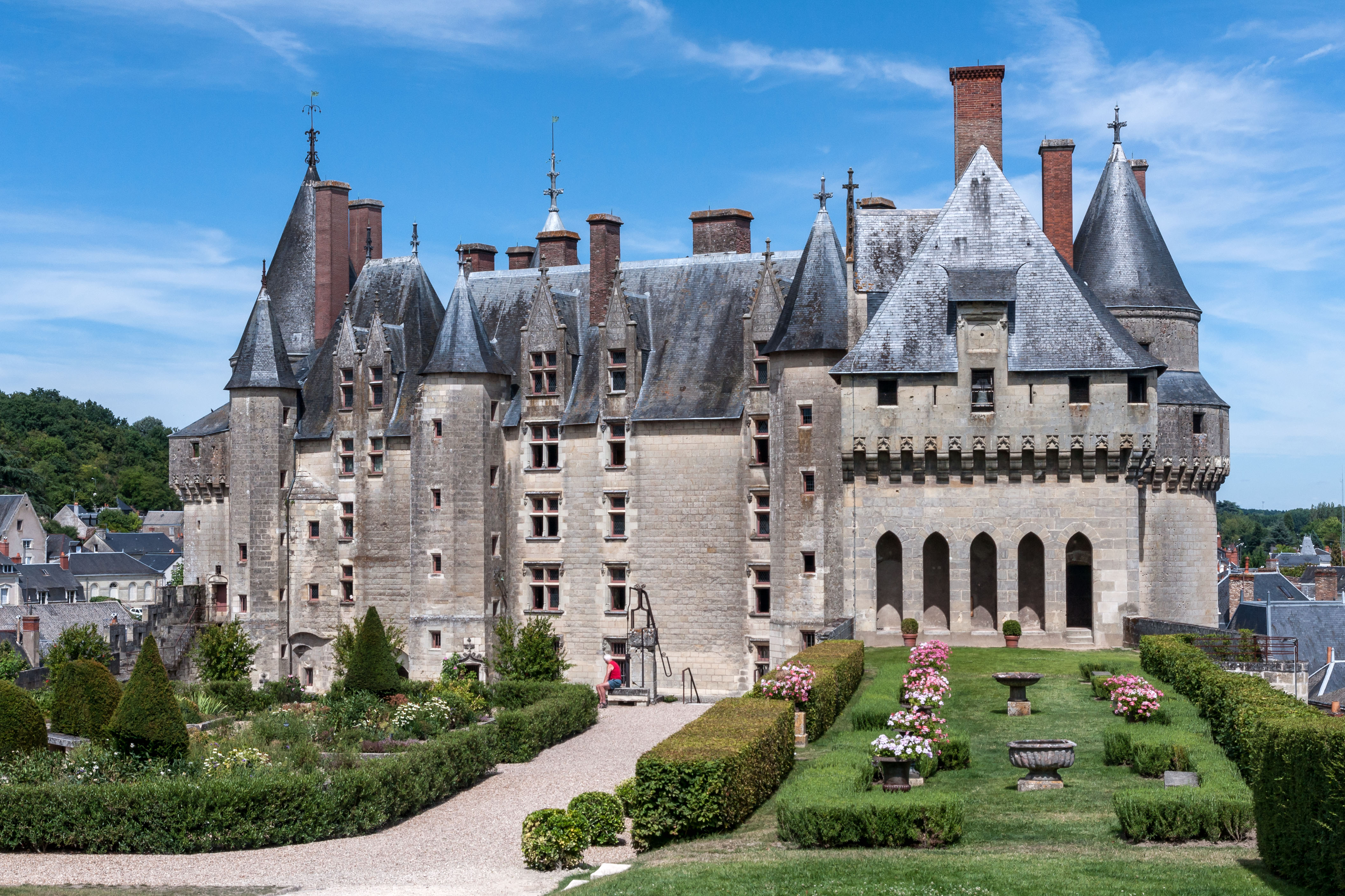 Le château de Langeais vu des jardins .